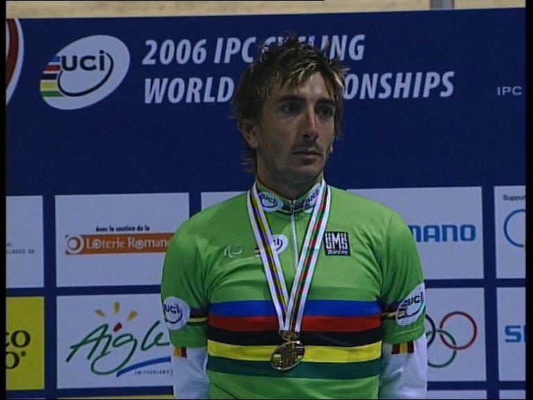 Podium Campeonato del Mundo